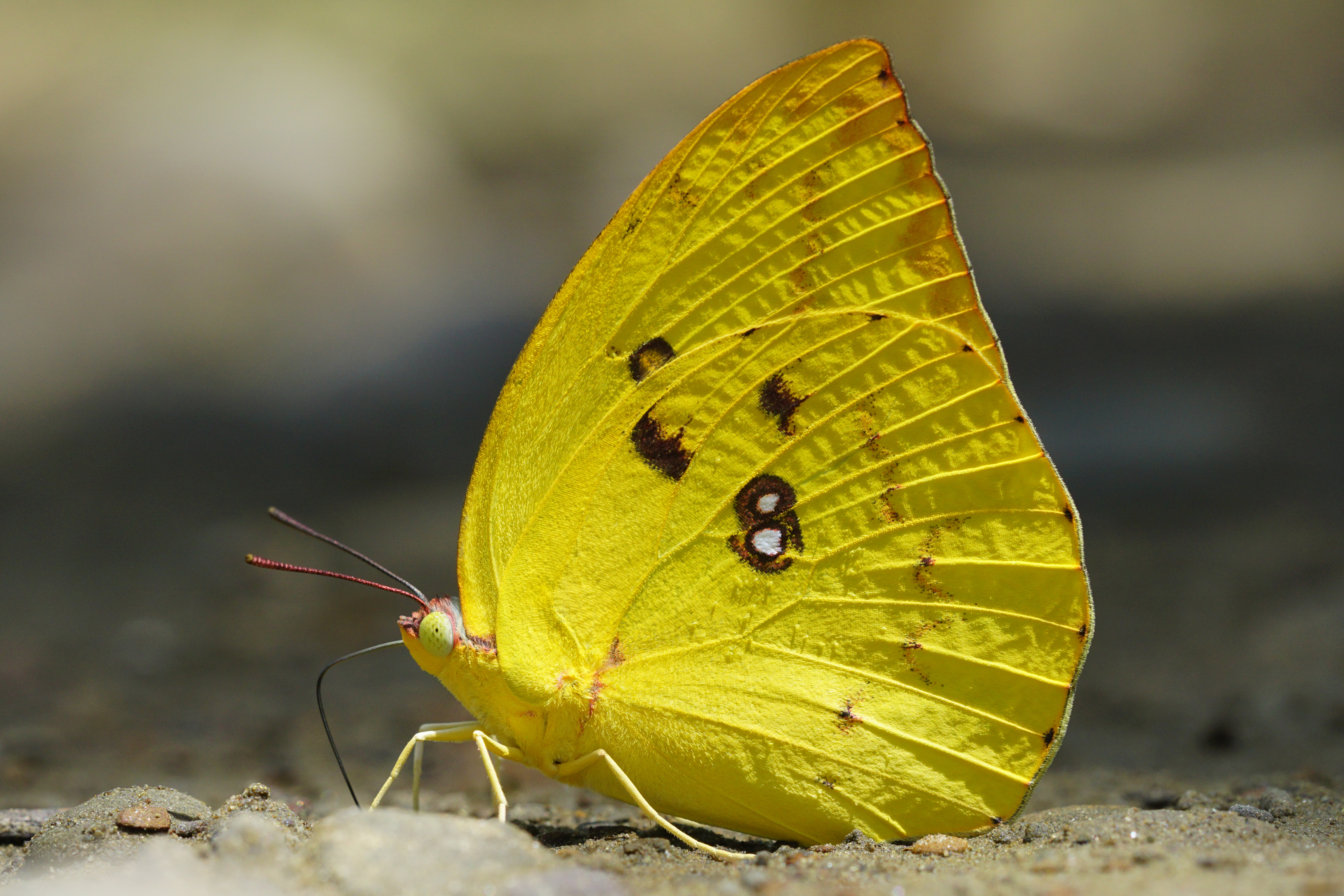 遷粉蝶 Catopsilia pomona 黃色銀紋型